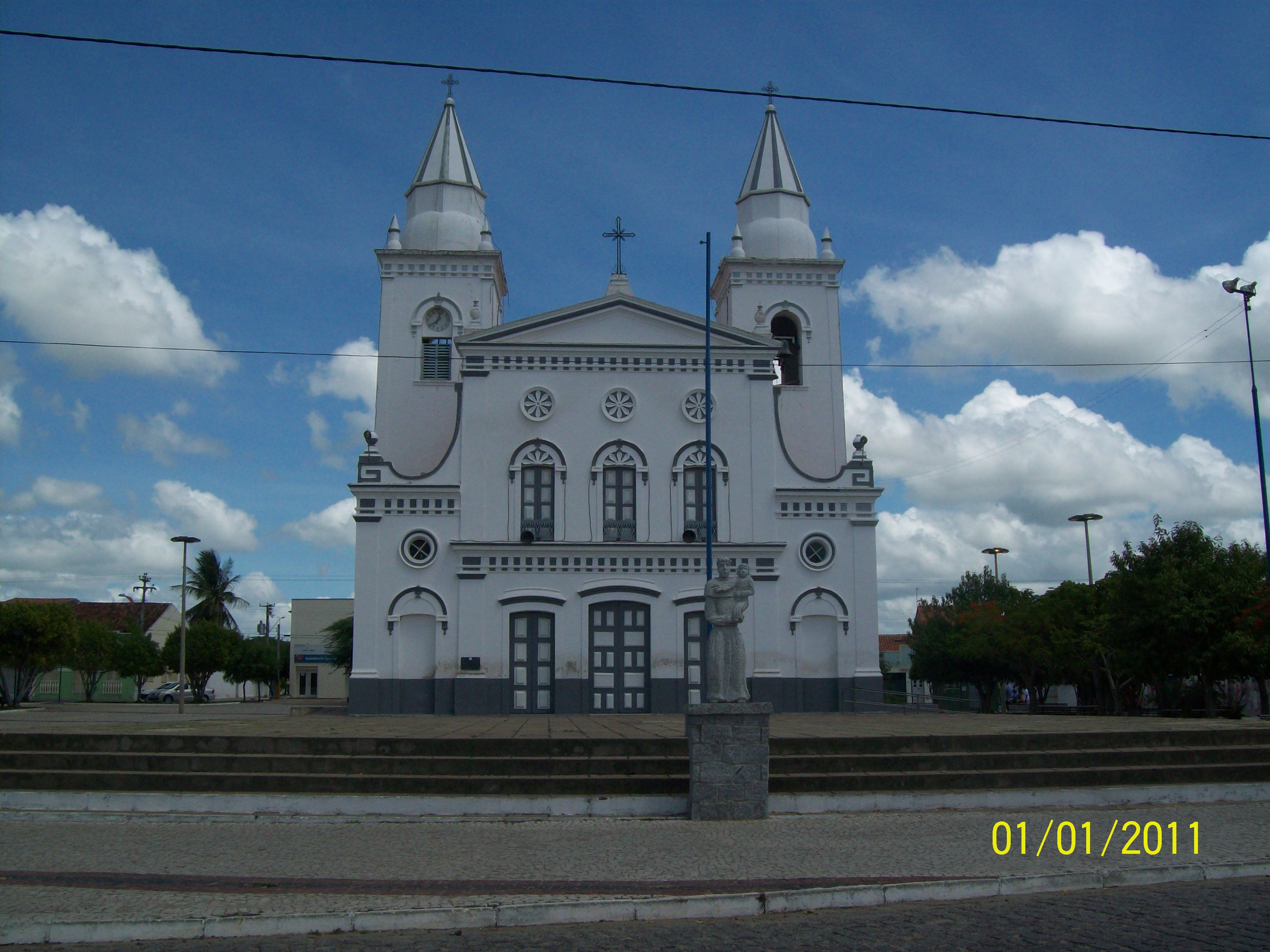 Quixeramobim CE Brasil - Igreja Matriz